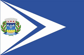 Português do Brasil: Bandeira de Monte Sião - MG